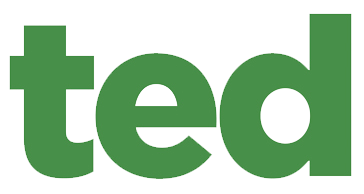 Logo zum Film "Ted"